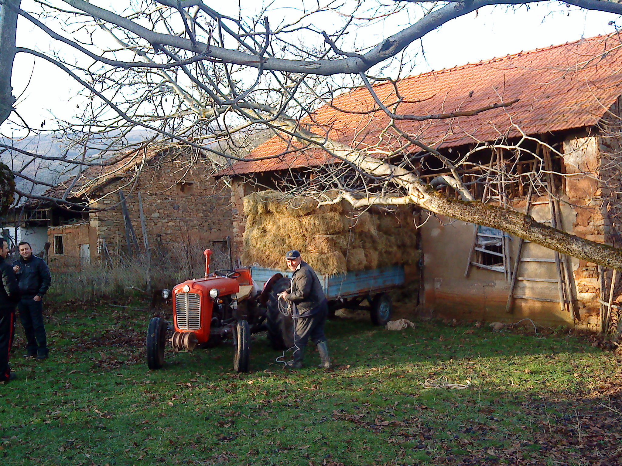 Земјоделец село Ѓавато